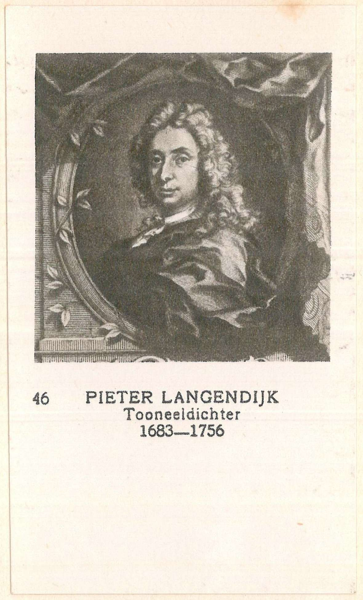 46 Pieter Langendijk, Tooneeldichter, 1683-1756. Vaderlandse Historie 2 (1926)